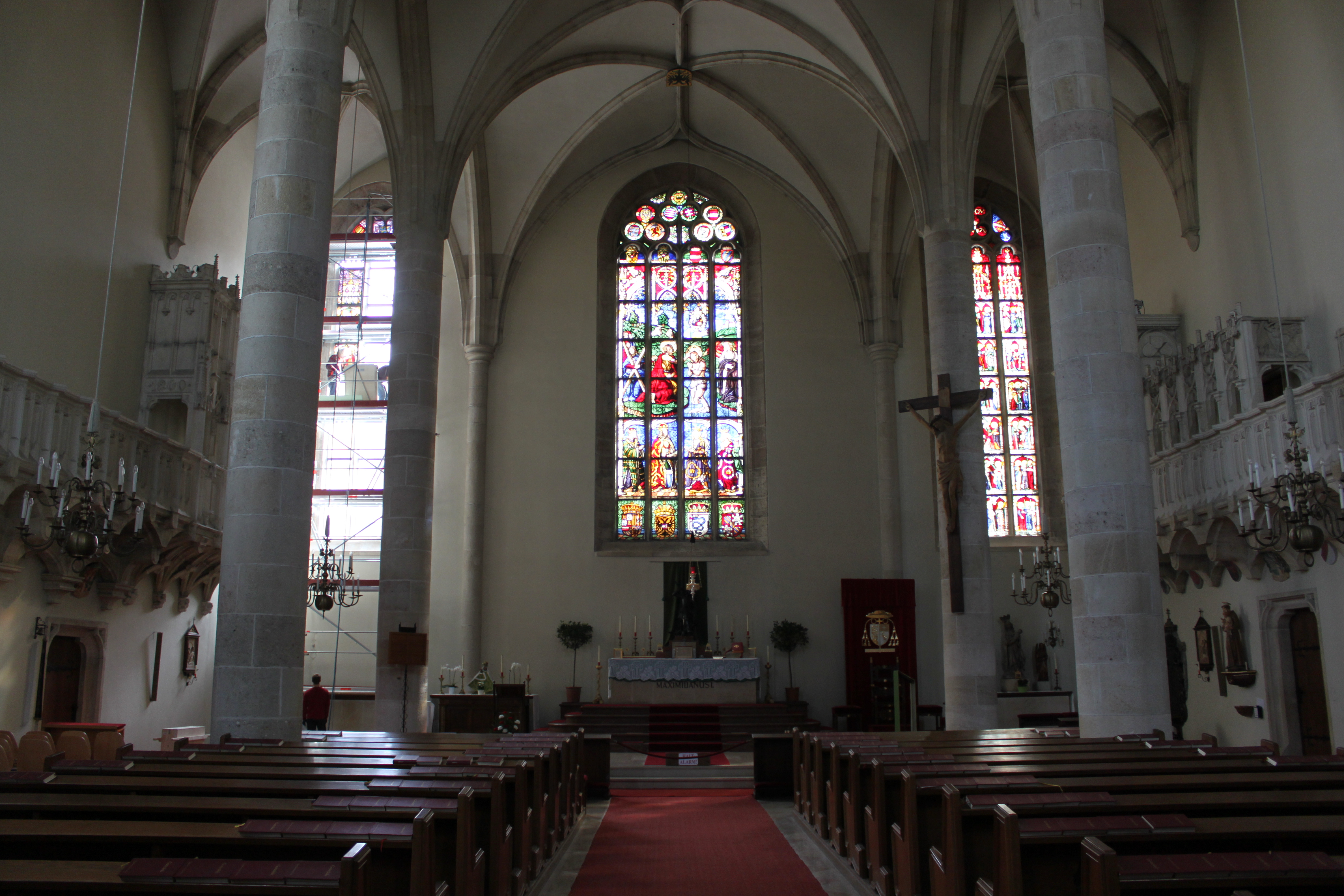 Georgskapelle, Altarwand